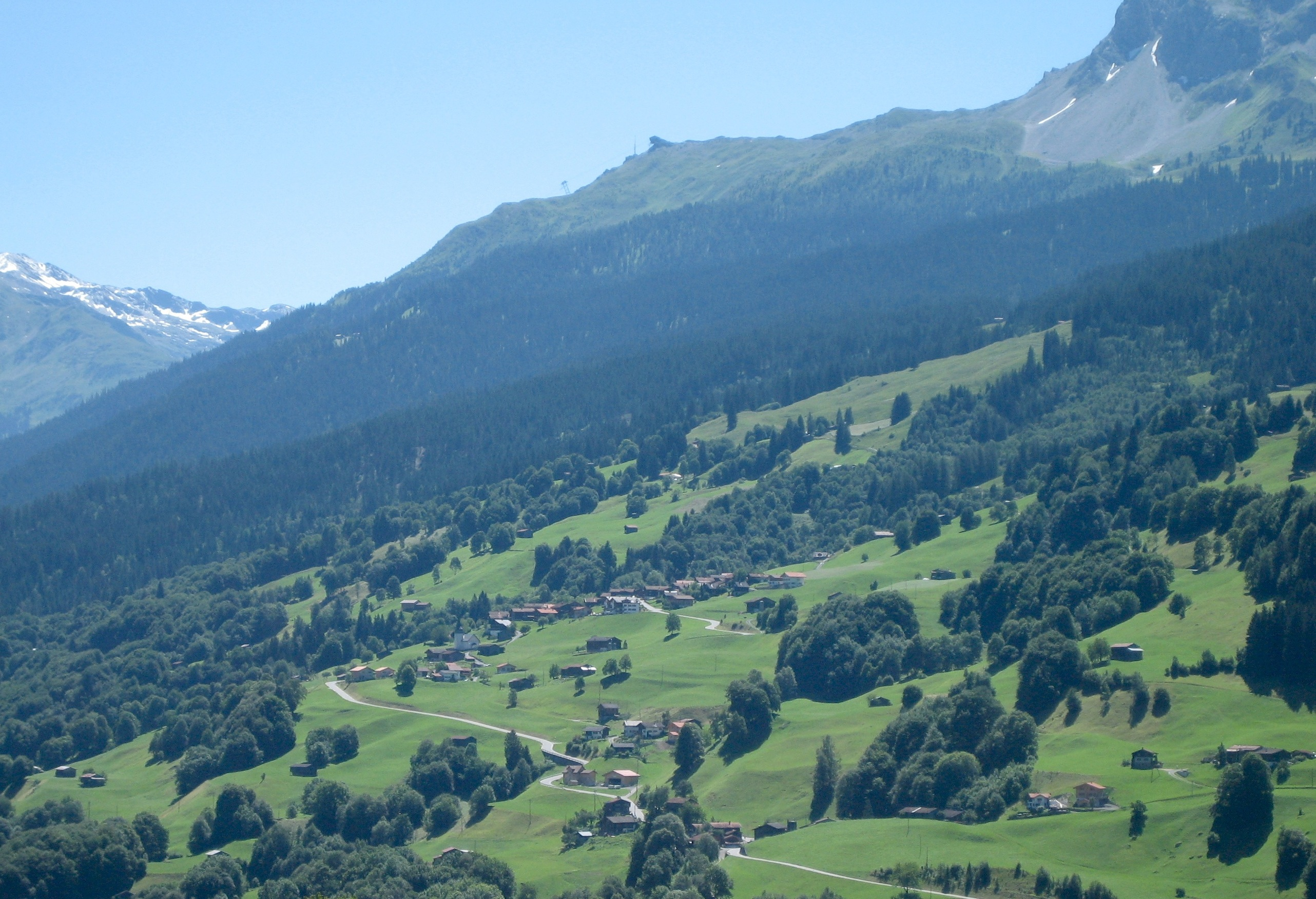 Wiesen GR